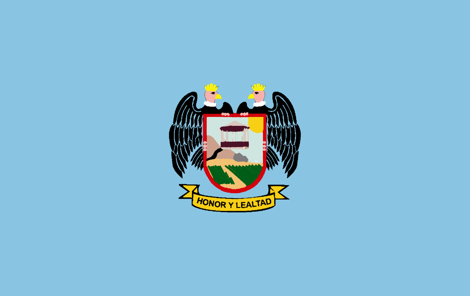 Distrito de Aucallama Provincia de Huaral Departamento de Lima